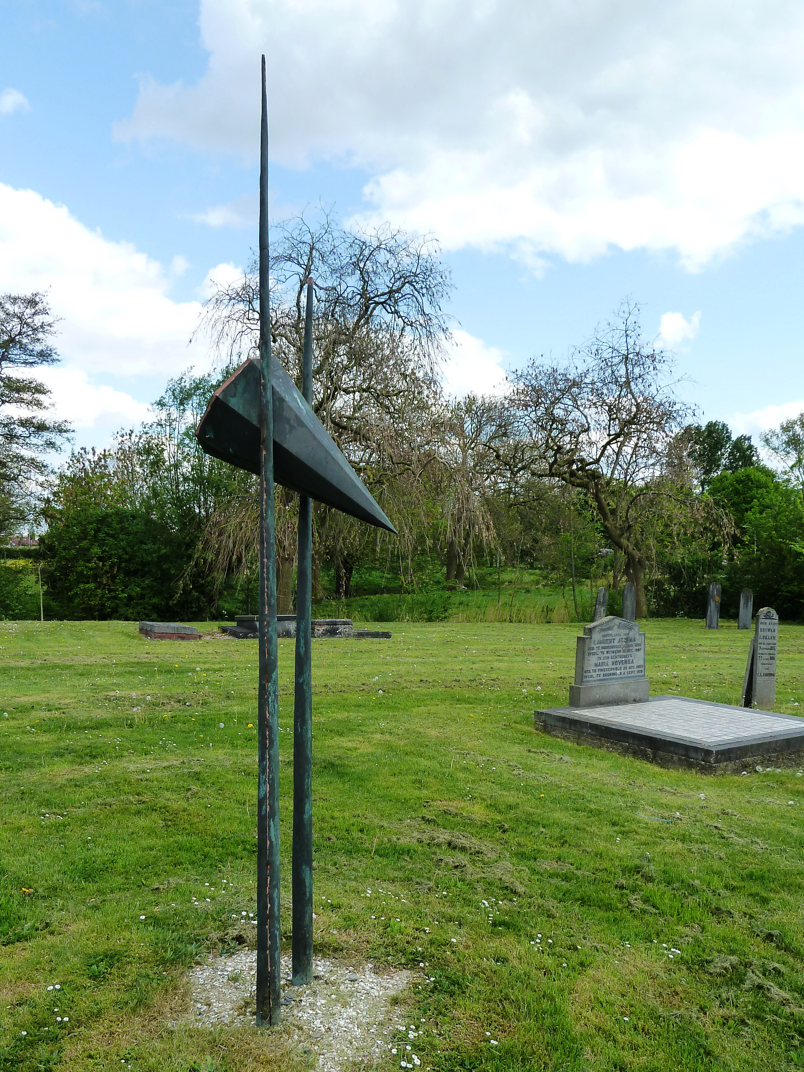 Kunstwerk ter nagedachtenis aan de toren van de afgebroken kerk van Weiwerd. In 1993 geplaatst door het Nutsdepartement Heveskes ter ere van het 175-jarig bestaan.